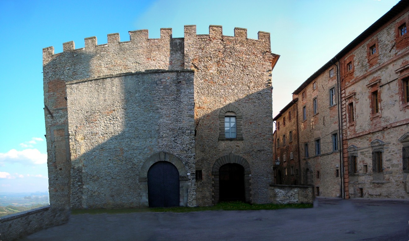 rocca of Monte Santa Maria Tiberina, Perugia, Umbria, Italy